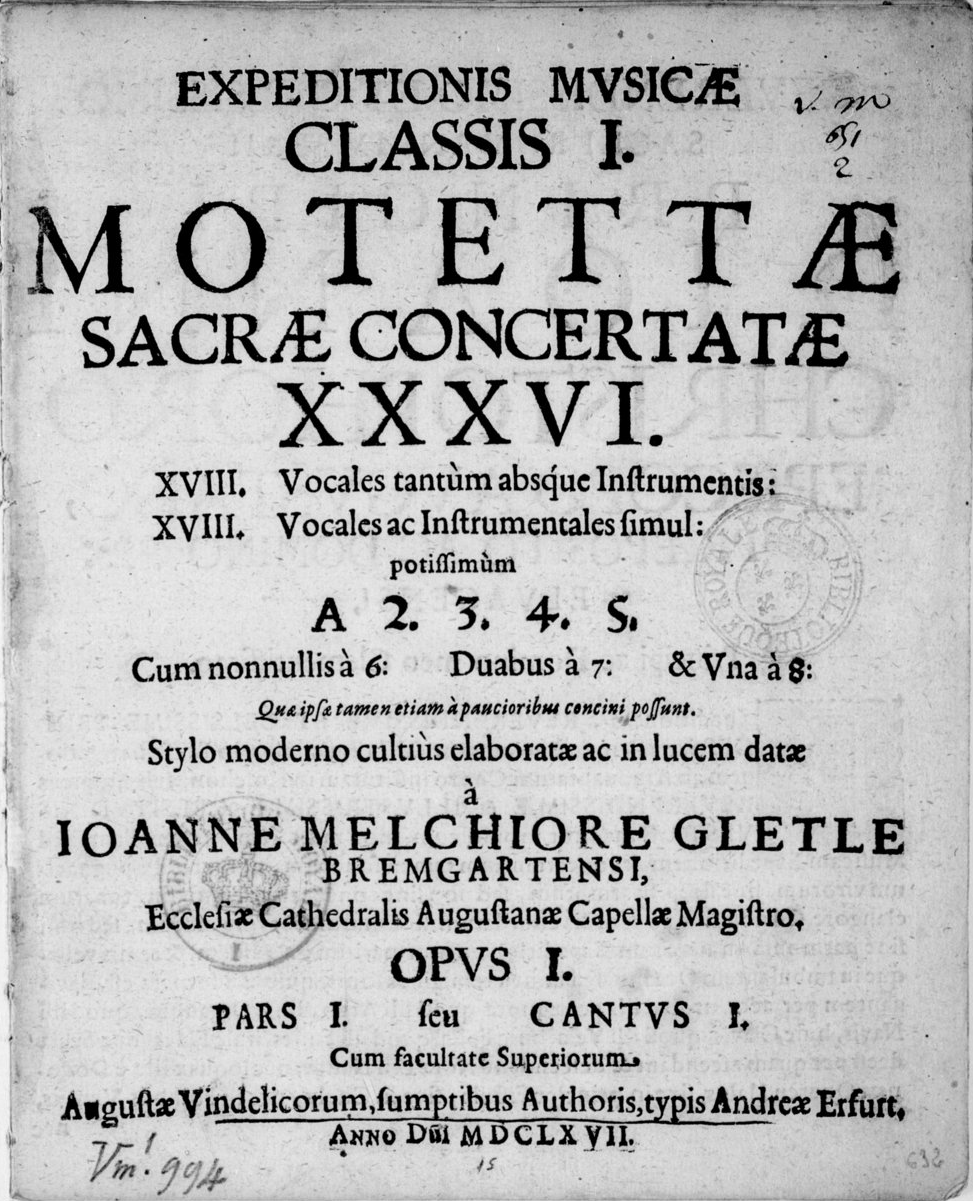 Page de titre de l'opus 1 de Johann Melchior Gletle, Expeditionis musicae classis I : Motetta Sacra concertata (1667).